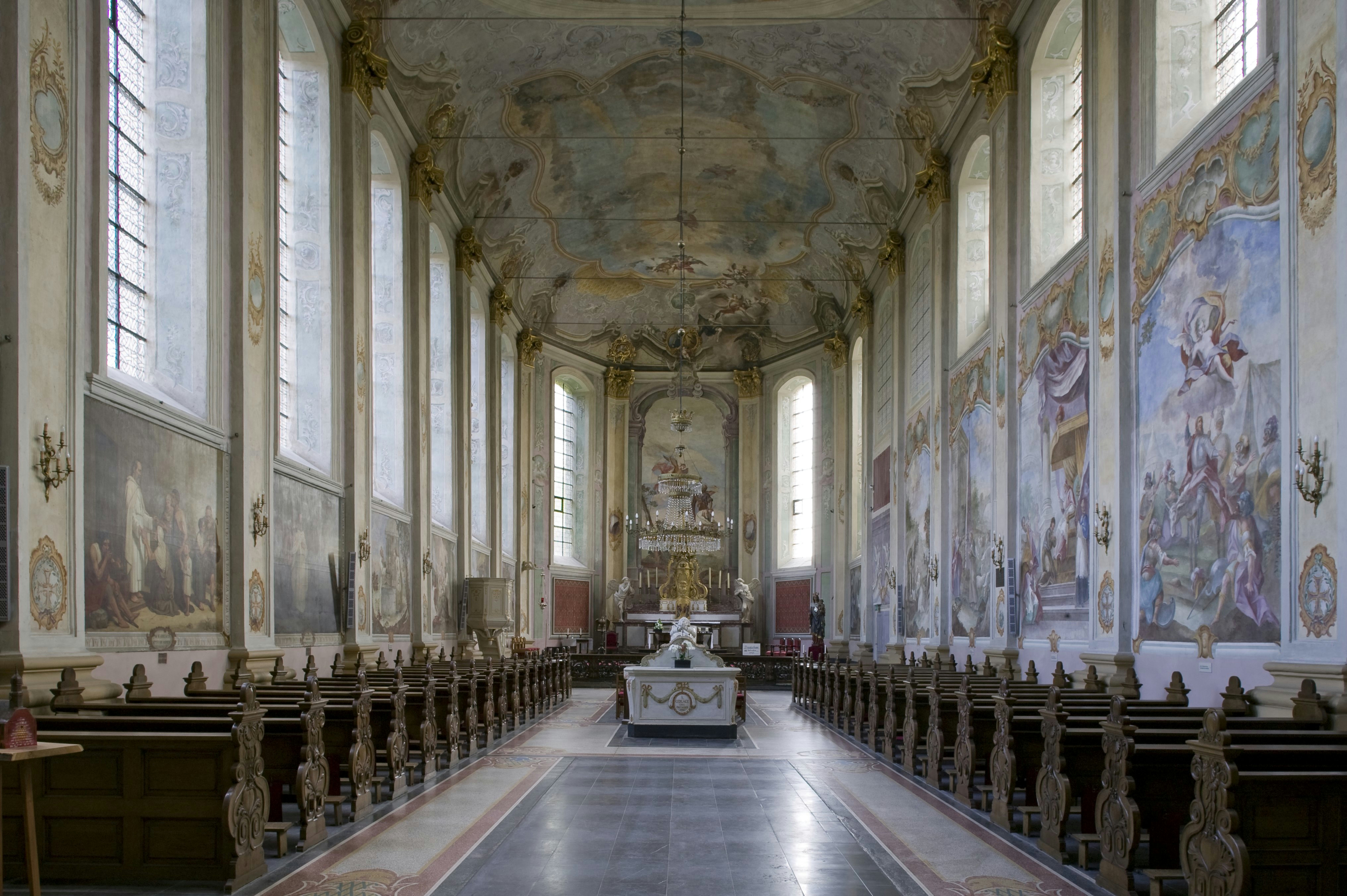 Sint Gerlachuskerk: Interieur, overzicht van de kerk na de restauraties van de schilderingen.